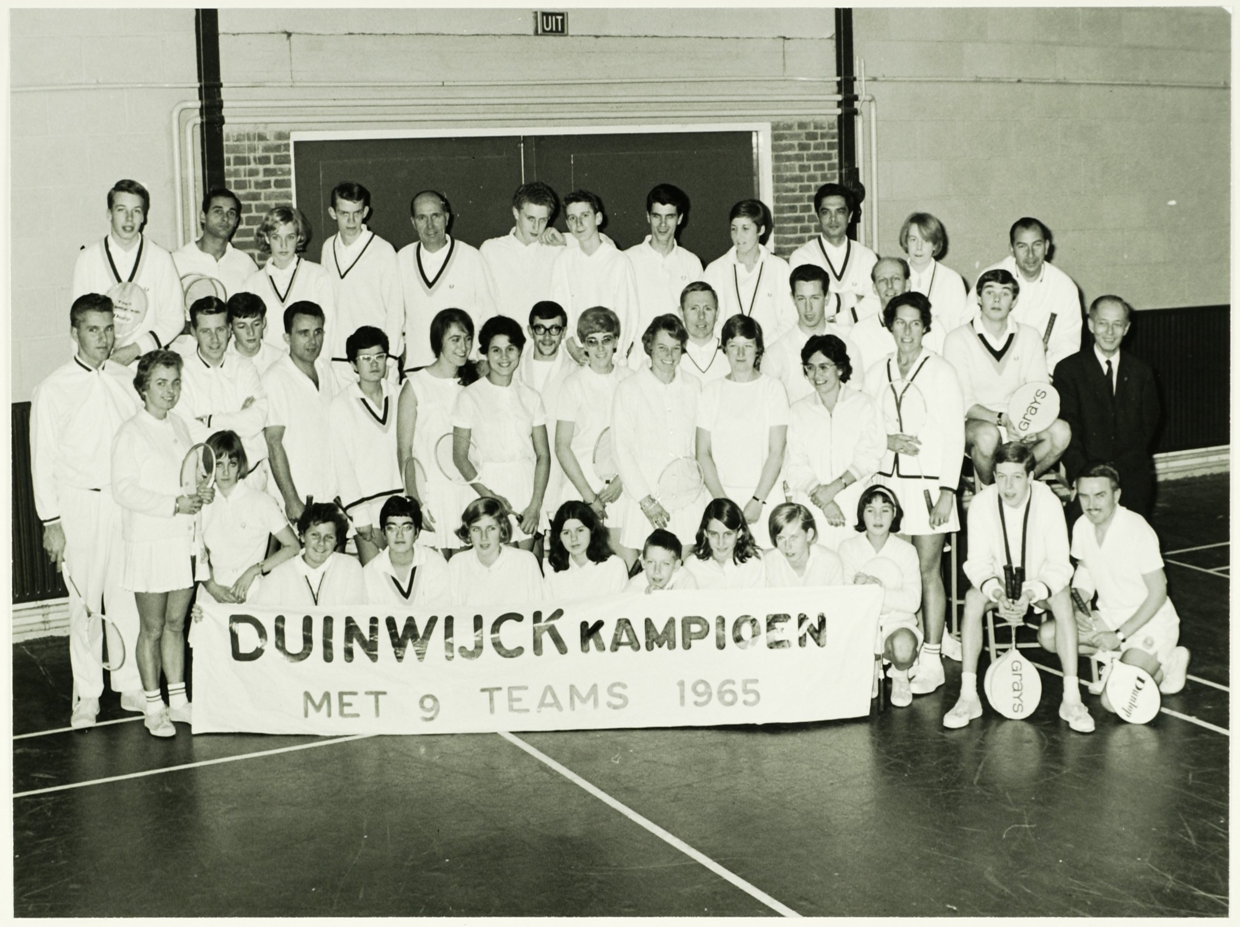 CollectieCollectie Fotoburo de BoerInventarisnummerNL-HlmNHA_5400467066 BeschrijvingRecreatieFotonummerNL-HlmNHA_5400467066DocumenttypeHistorieprenten, tekeningen en foto'sVervaardigerBoer, Cees de (1918-1985) LandNederland ProvincieNoord-Holland Begindatum1975Einddatum1975TechniekFoto Plaatsinggb65